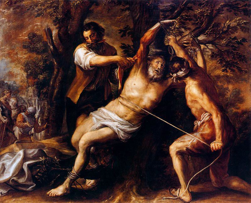 La obra representa el martirio del apóstol San Bartolomé, que según la tradición fue desollado vivo en Armenia.